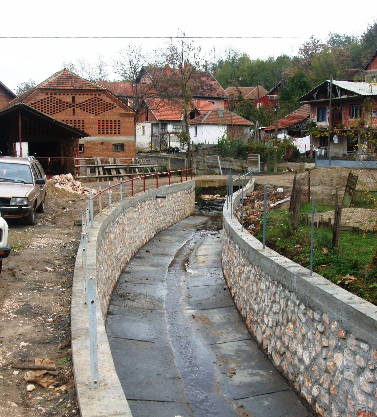 Варош (Ражањ)